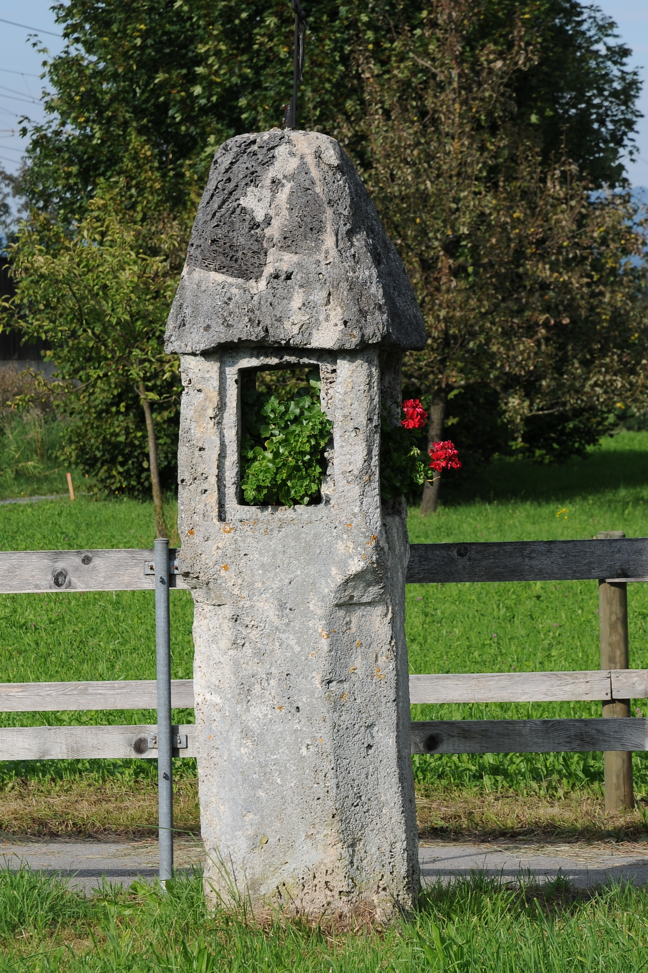 Bildstock an der Hatangergasse in Hohenems; Info Dieses Objekt steht unter Denkmalschutz.